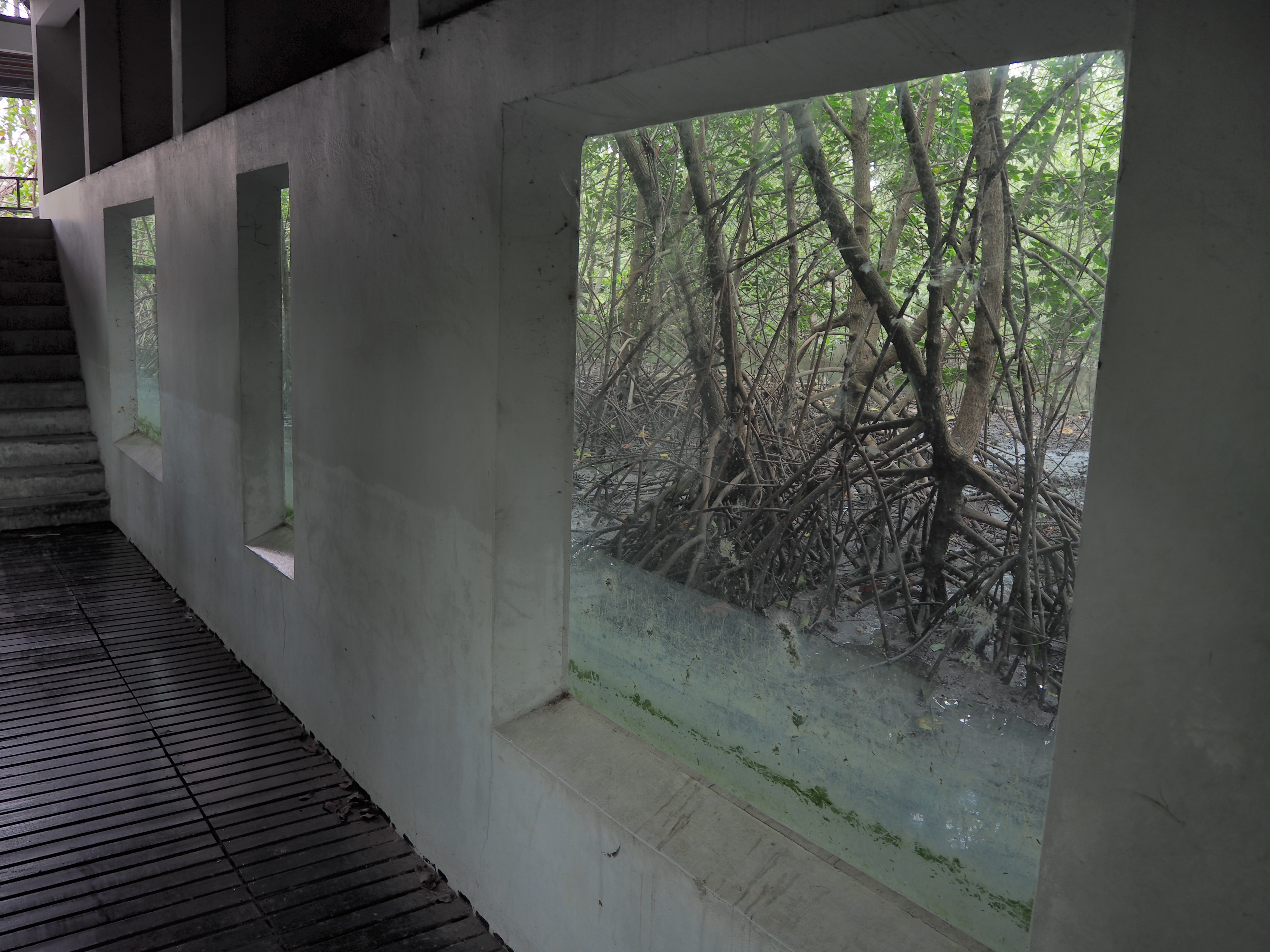 ศาลาชีวภาพใต้น้ำของศูนย์ศึกษาธรรมชาติและอนุรักษ์ป่าชายเลนเพื่อการท่องเที่ยวเชิงนิเวศ จ.ชลบุรี